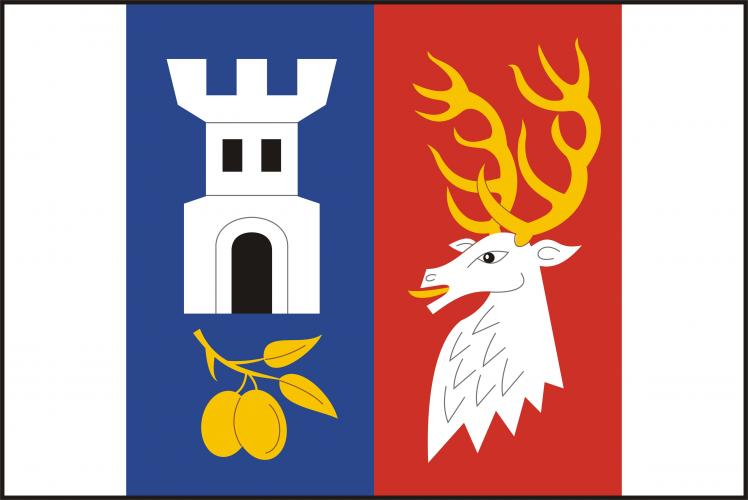 Budíškovice vlajka